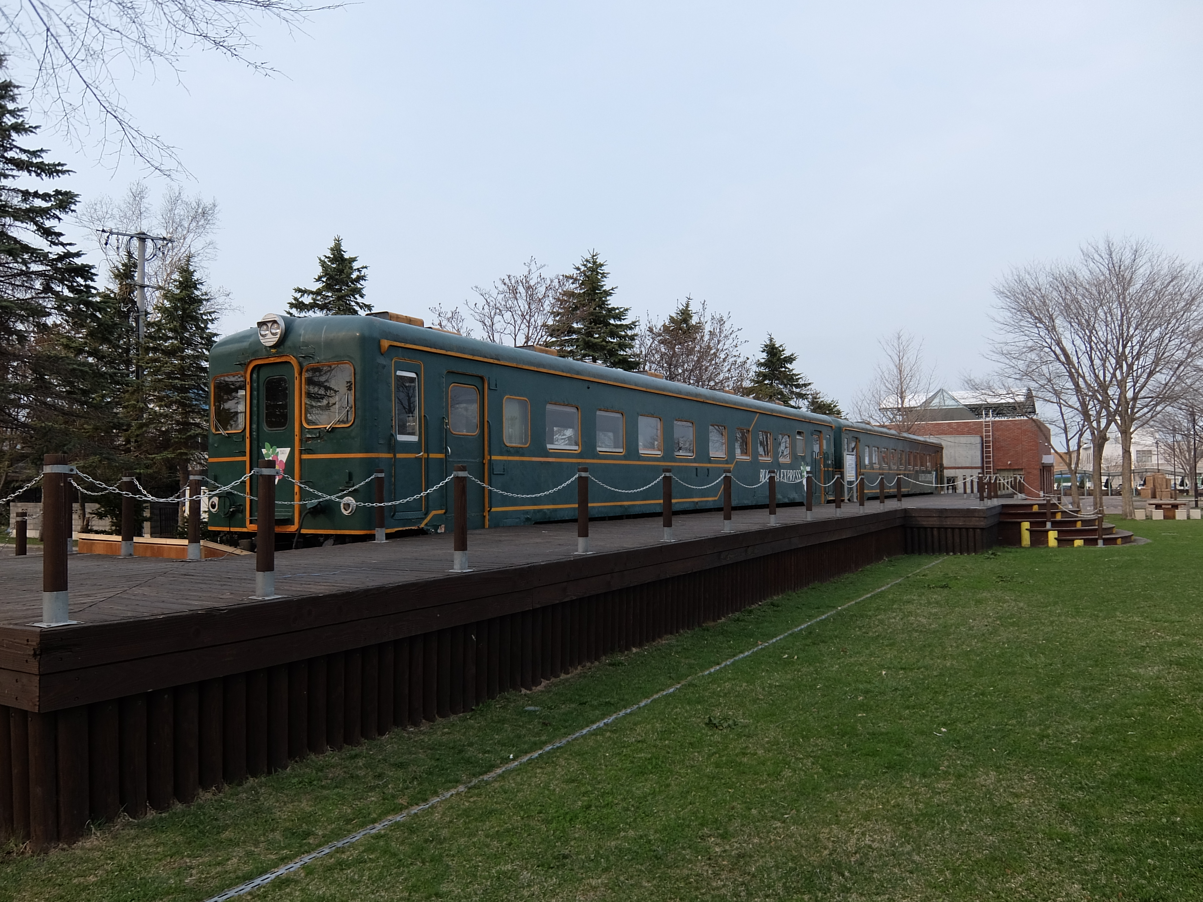 旧興部駅跡 道の駅おこっぺ